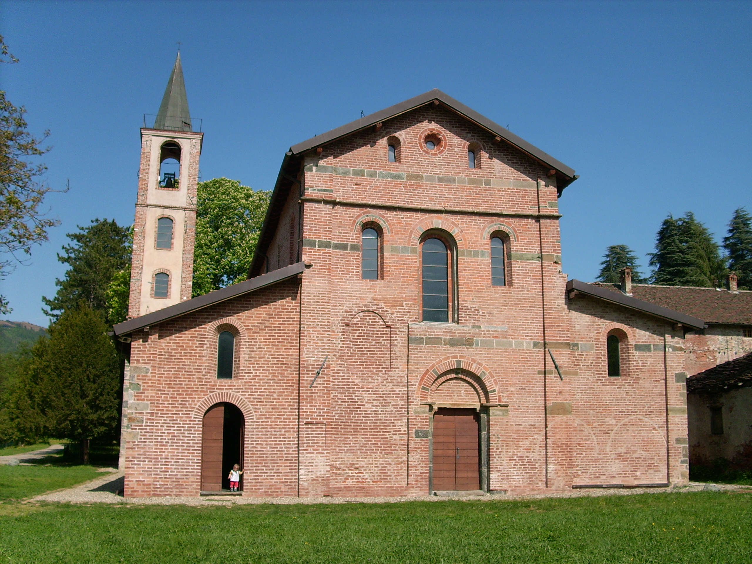 Badia di Tiglieto, Liguria, Italia